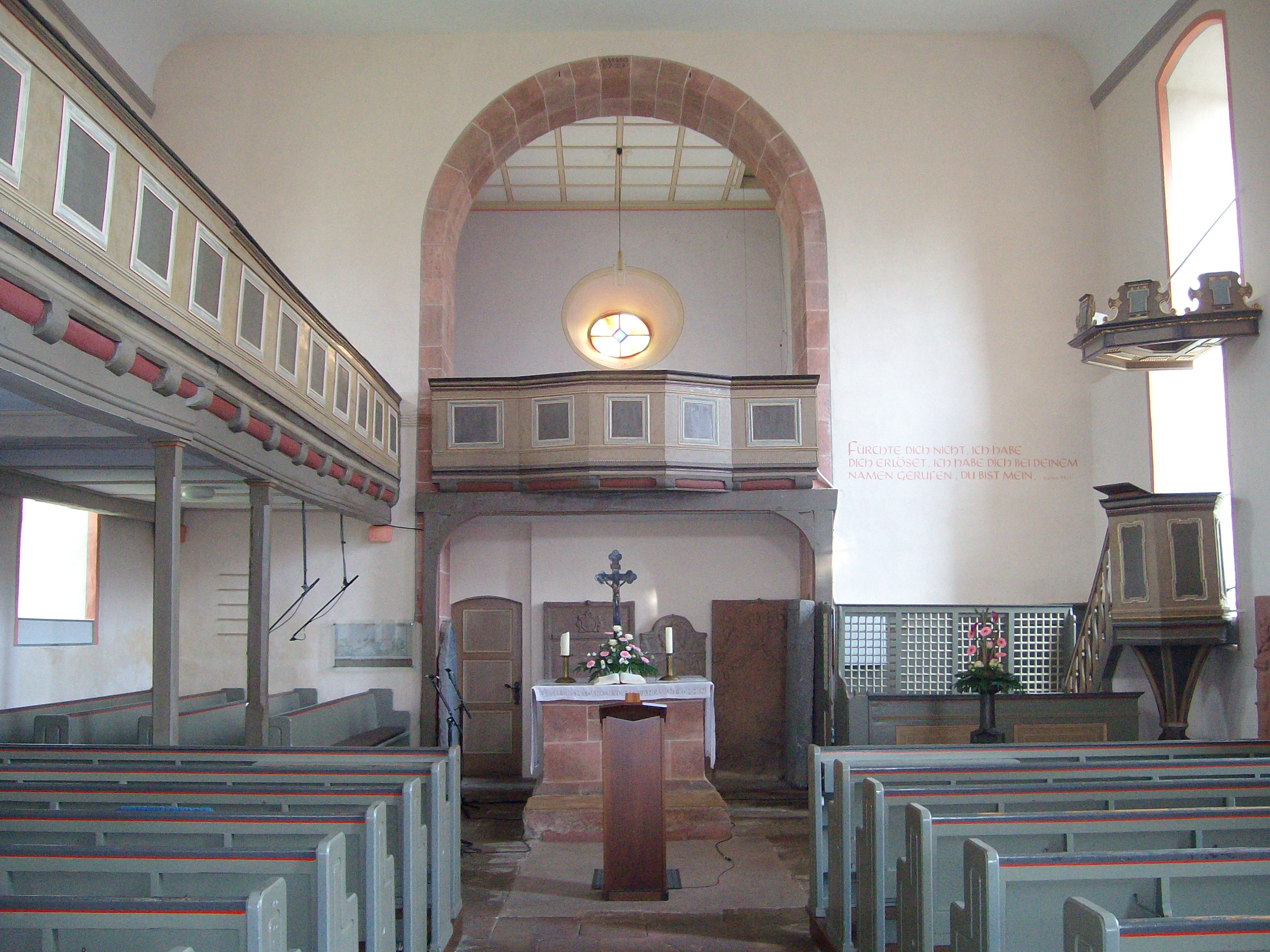 Hospitalkirche Grünberg, Landkreis Gießen, Hessen, Deutschland